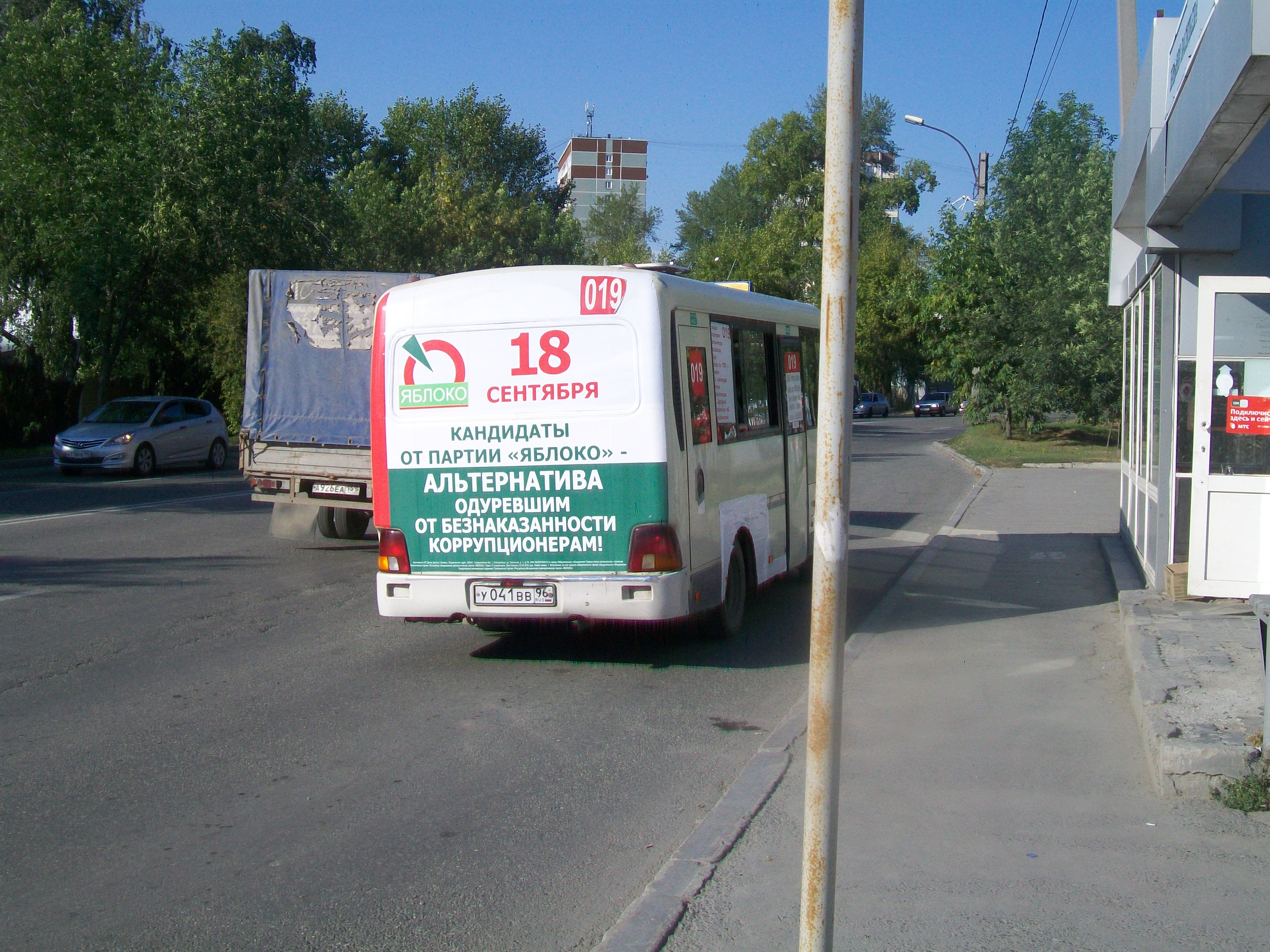 Автобус с агитацией партии "Яблоко". Екатеринбург. Август 2016 года